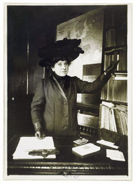 "Portrait d'Hubertine Auclert". Hubertine Auclert (1848-1914), féministe française, fondatrice du journal "La Citoyenne", en faveur du droit de vote des femmes. Photographie de Harlingue, 1910. Paris, Bibliothèque Marguerite Durand. Dimensions : 18 x 13 cm